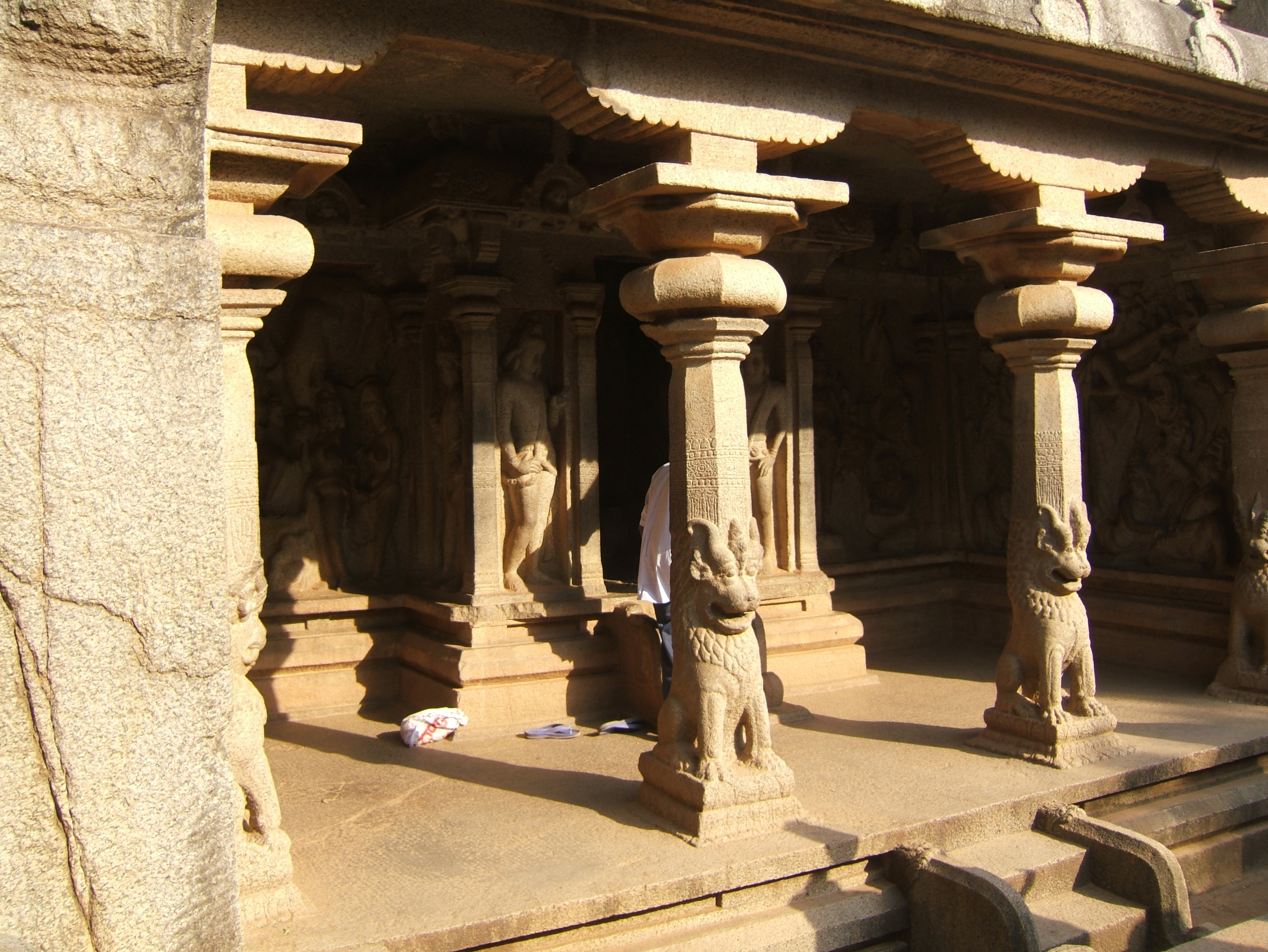 Varsha Mandapa Cave, Mahabalipuram